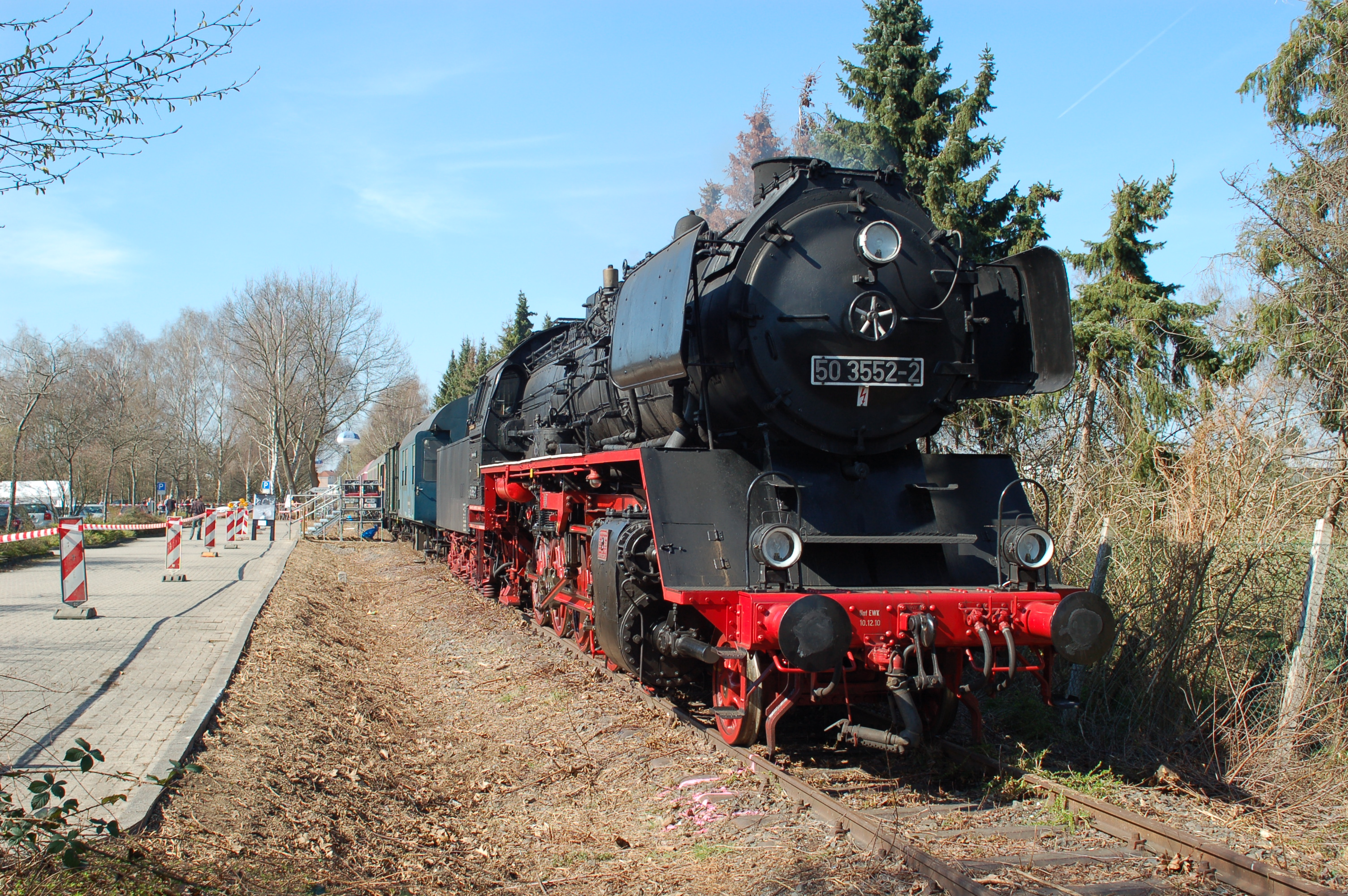 Der Zug der Erinnerung in Heinsberg, abgestellt neben dem Parkplatz der Kreisverwaltung auf der Bahnstrecke Lindern - Heinsberg.